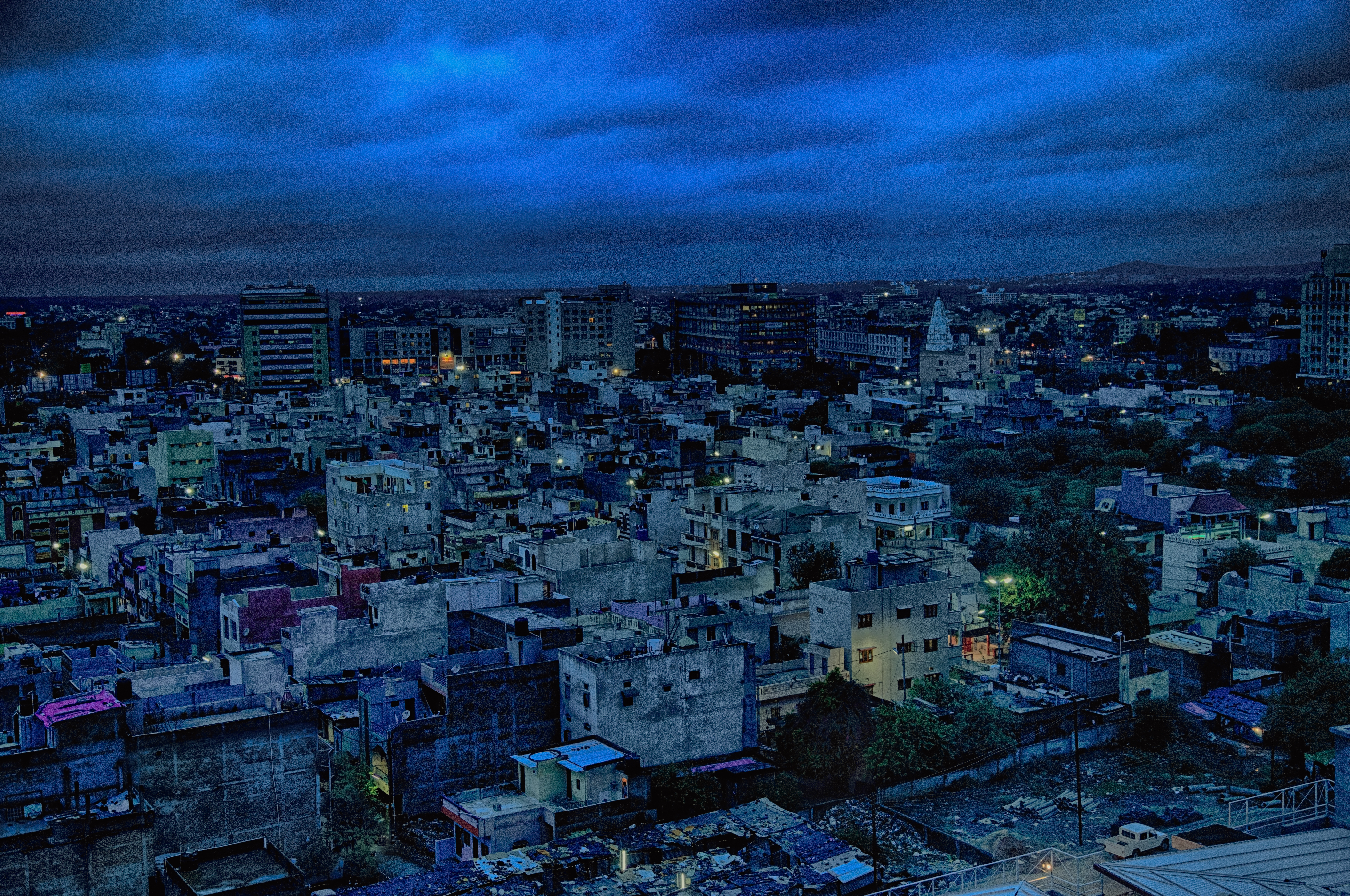 Evening Over Indore